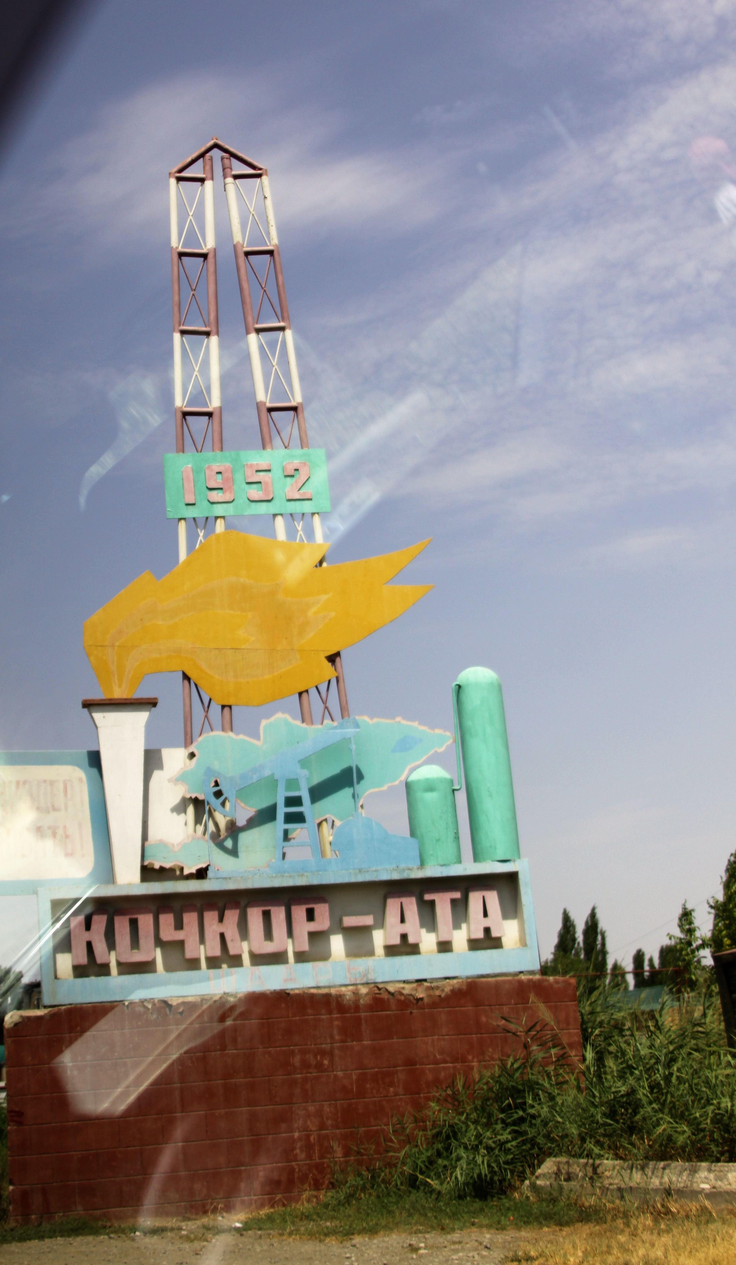 Kirghizistan 2018 - Entrée de Kotchkor-Ata